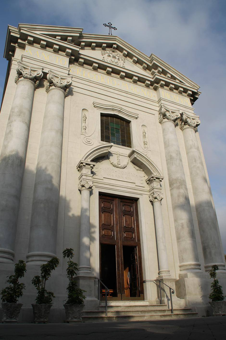 Chiesa di San Gregorio Magno di Villafranca Tirrena This is a photo of a monument which is part of cultural heritage of Italy.